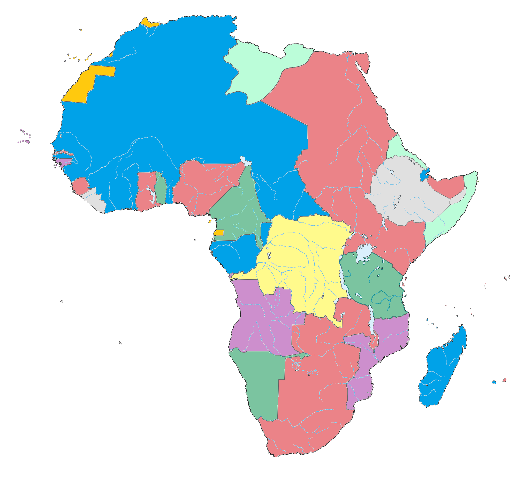 Afrique coloniale en 1914